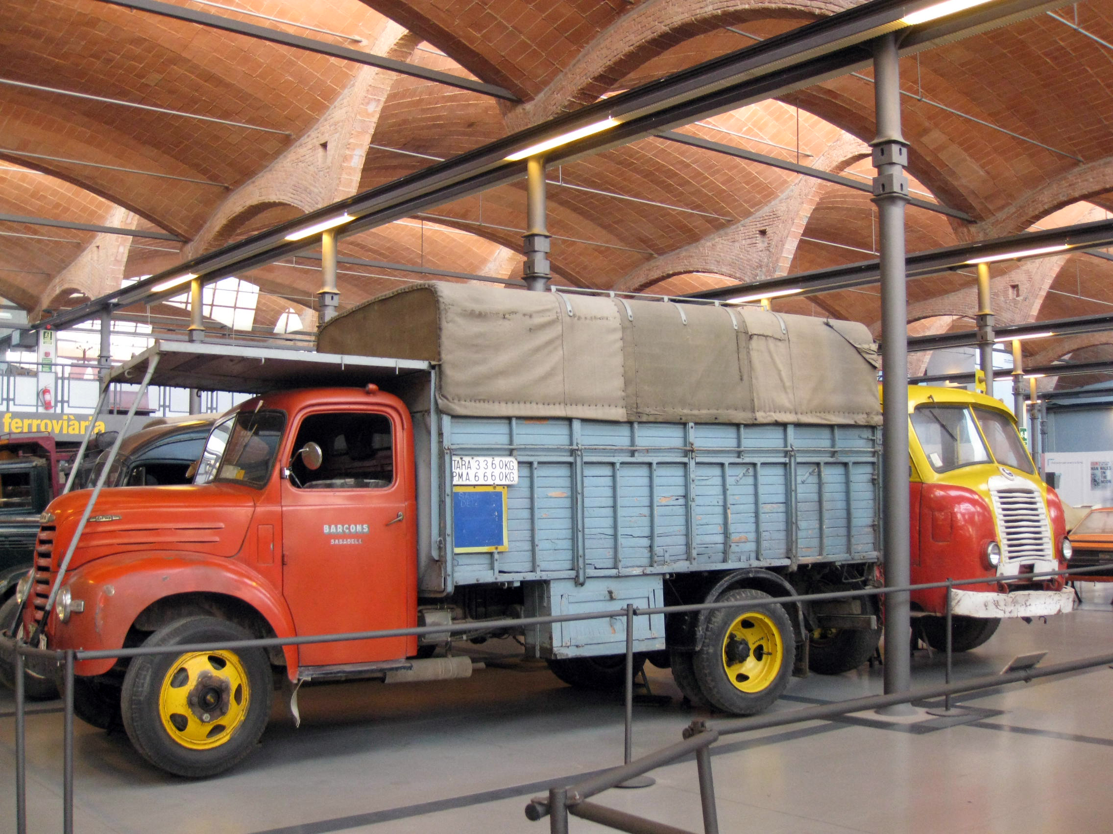 Fàbrica Aymerich, Amat i Jover (Terrassa) Object location41° 33′ 54.49″ N, 2° 00′ 28.14″ E